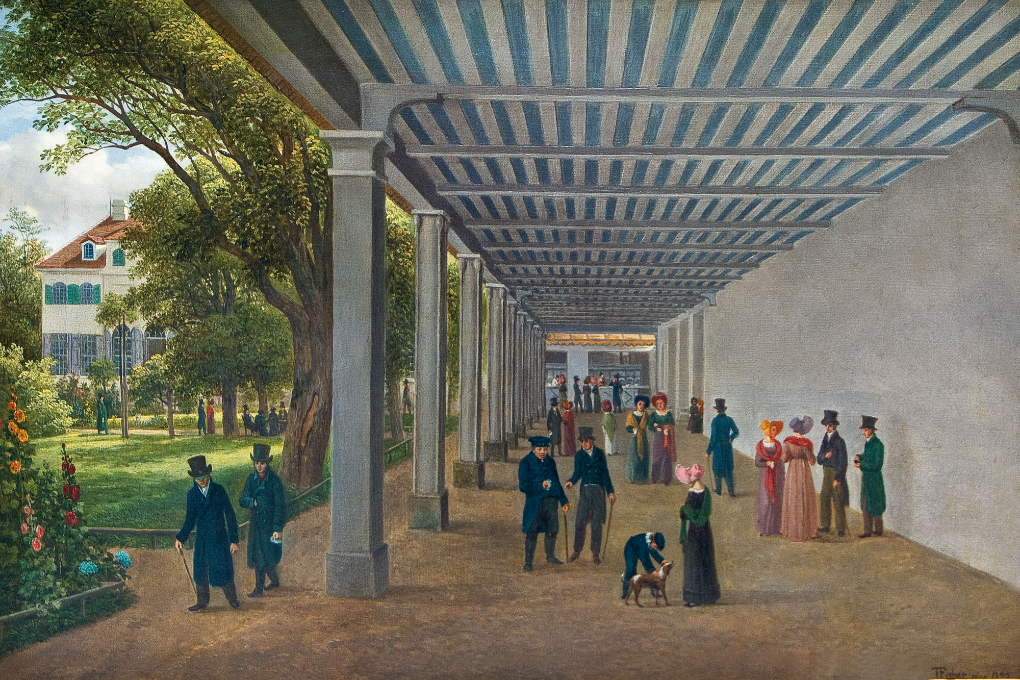 Dr. Struwes Trinkhalle in Teplitz-Schönau mit Kurgästen. Öl auf Leinwand, 41 x 60 cm